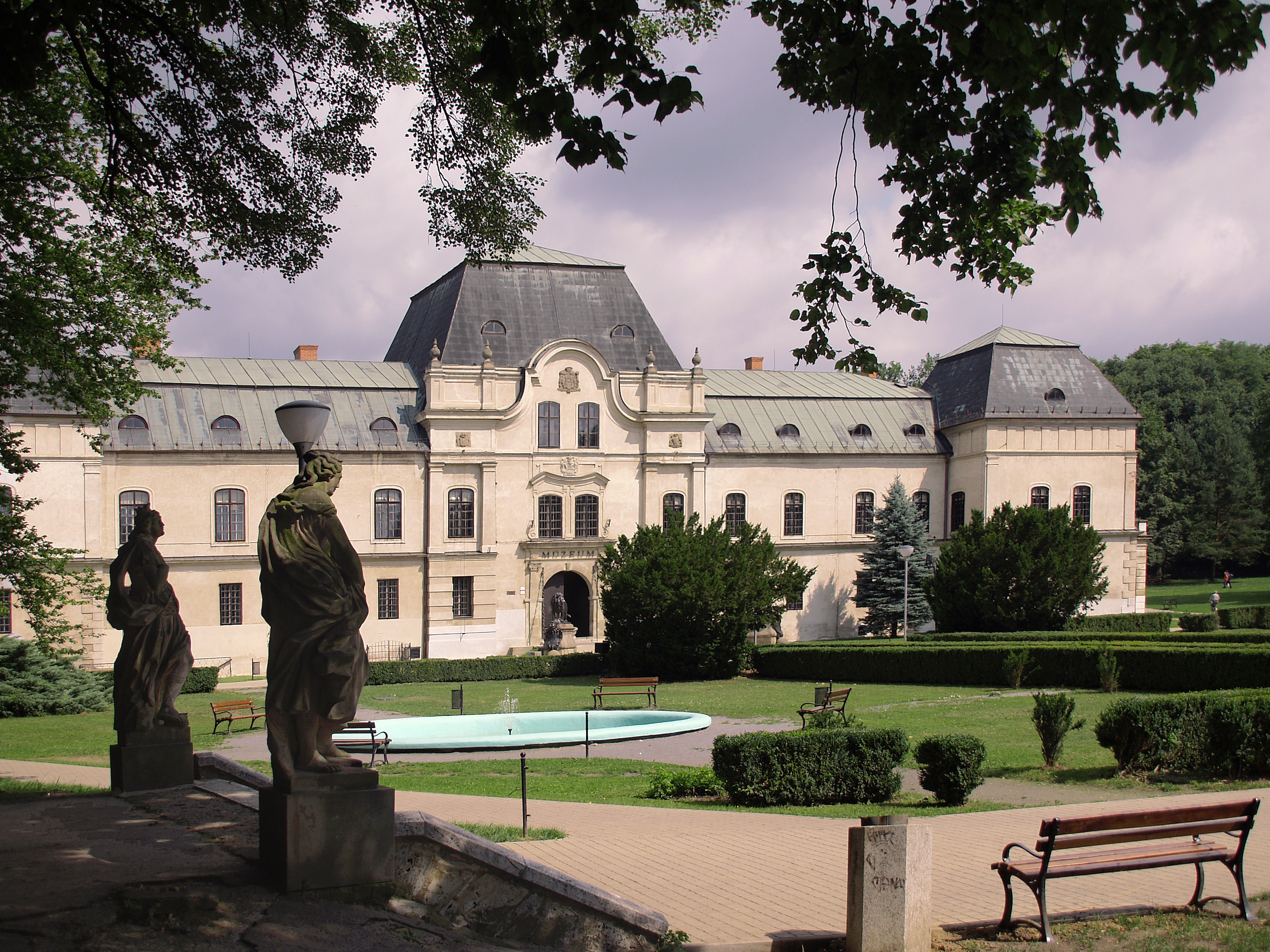 Humenné - Le manoir Múzeum This medium shows the protected monument with the number 702-109/1 in the Slovak Republic. This medium shows the protected monument with the number 702-109/2 in the Slovak Republic.